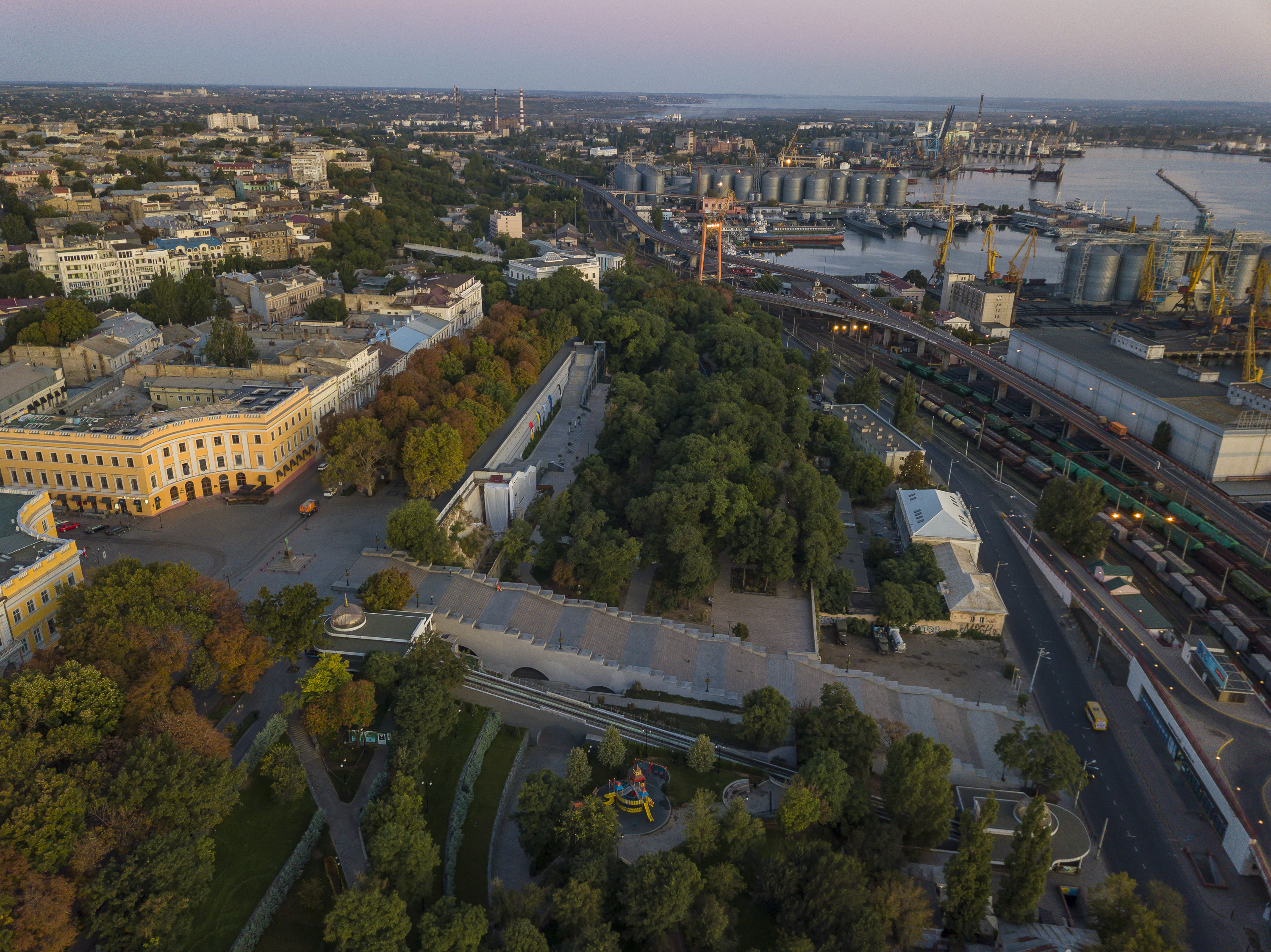 Приморські (Гігантські, буларні, Потьомкінські) сходи, Одеса, Приморський бул.